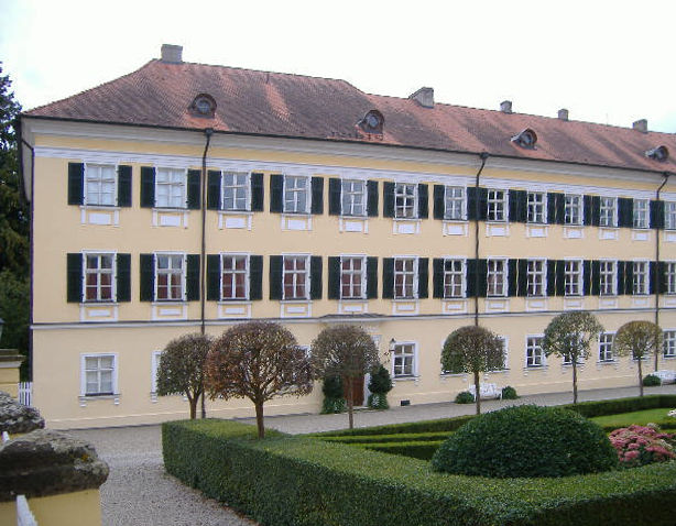 Schloss